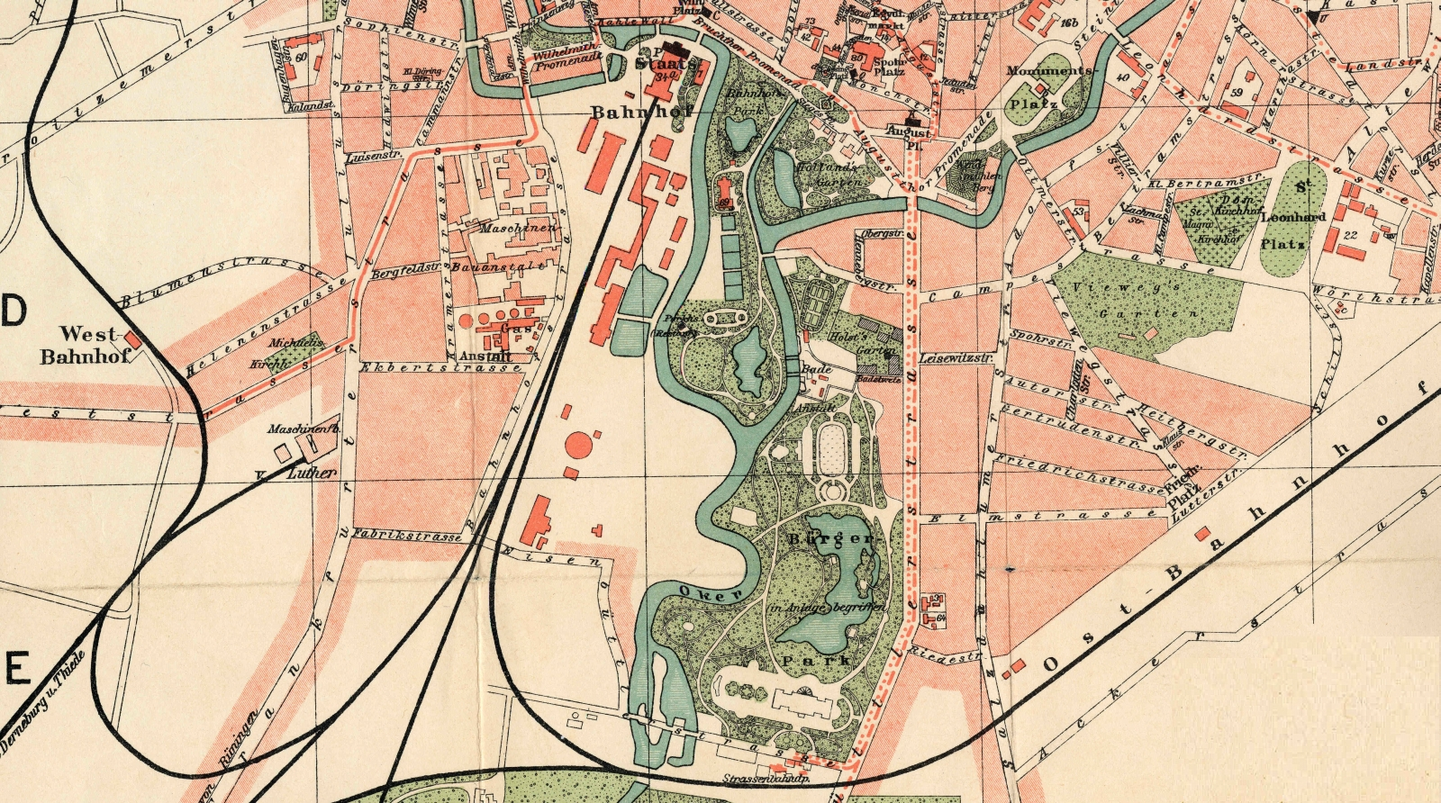 Braunschweig: Kartenausschnitt des südlichen Stadtgebietes um 1899. Braunschweig, Germany: Map section showing the southern city, approx. around 1899.